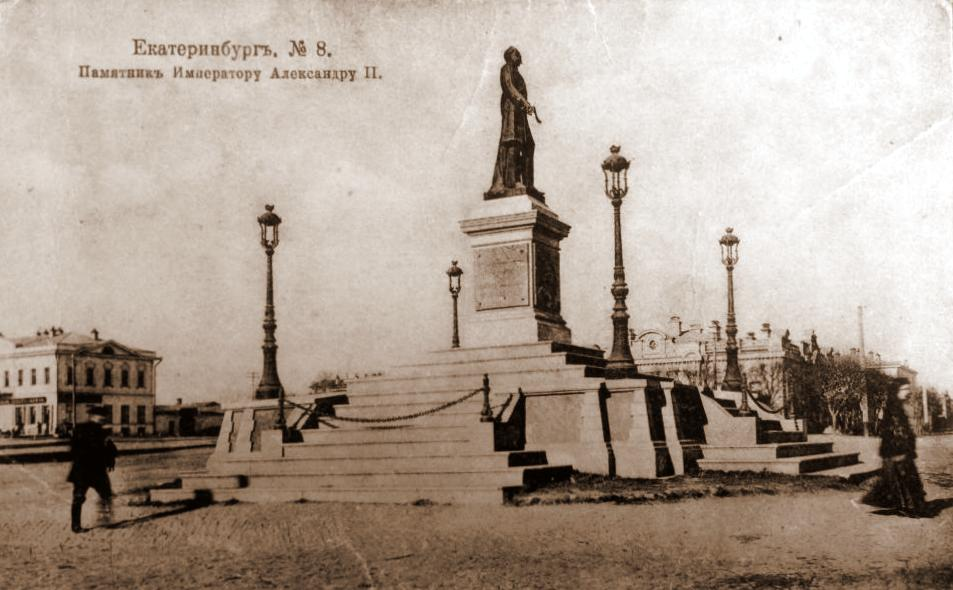 Памятник императору Александру II в Екатеринбурге, Россия.